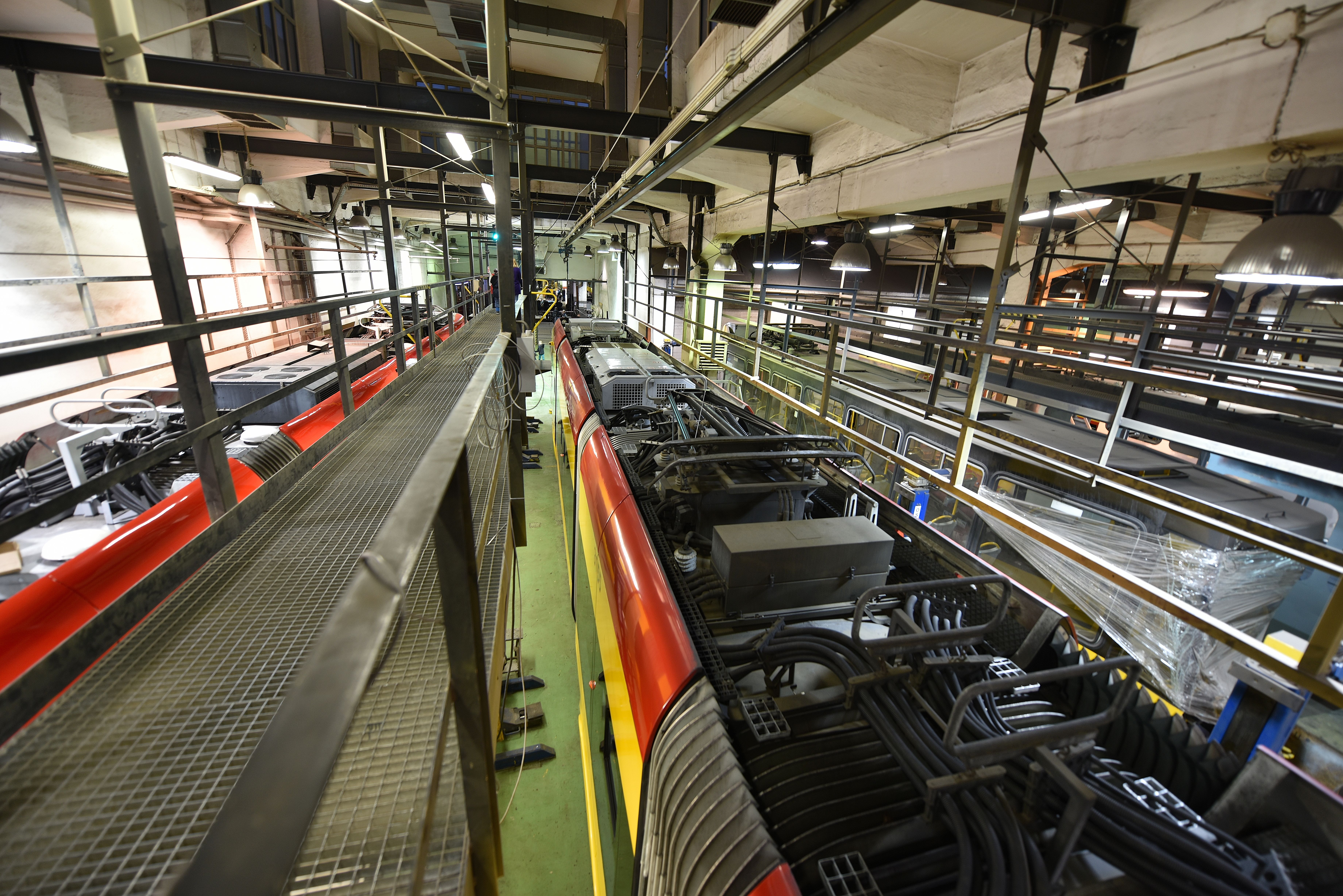 Dach remontowanej Pesy Swing w hali warsztatowej Zakładu Naprawy Tramwajów przy ul. Młynarskiej 2 w Warszawie (Zajezdnia Wola)